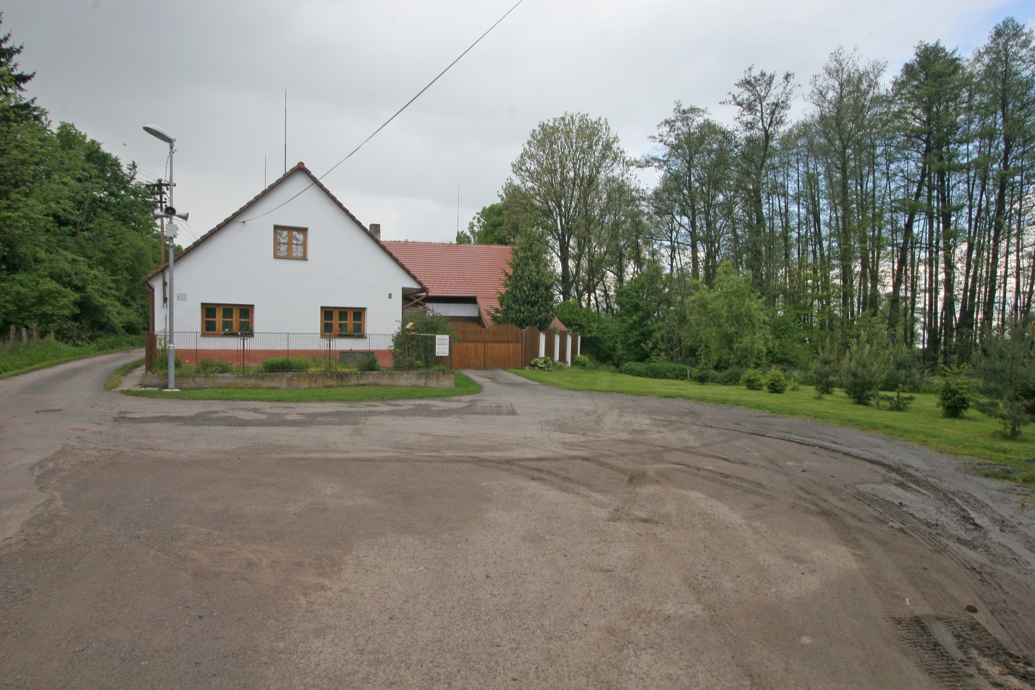 Skalice čp. 2